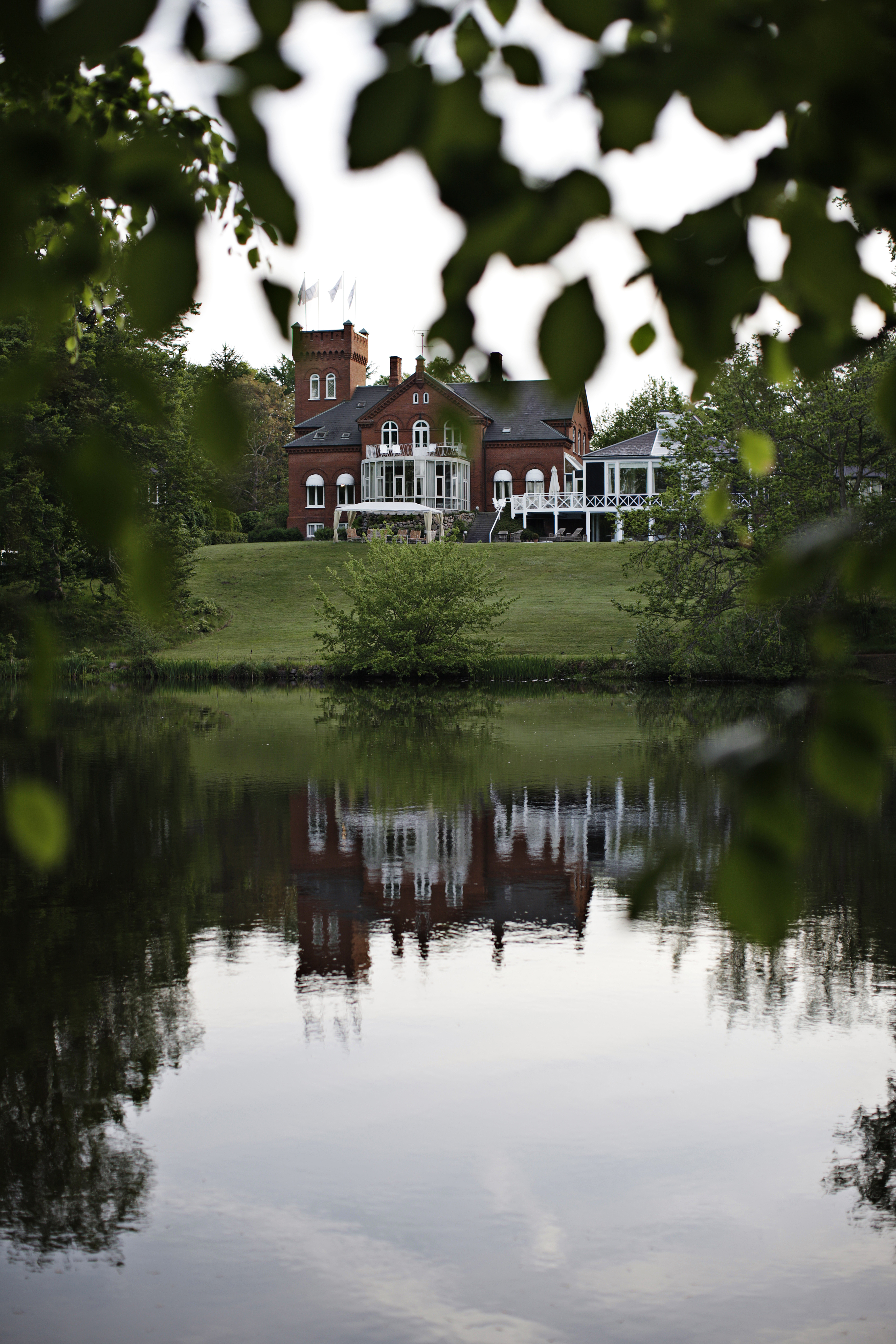 Havreholm Slot neat Humlebæk, Denmark